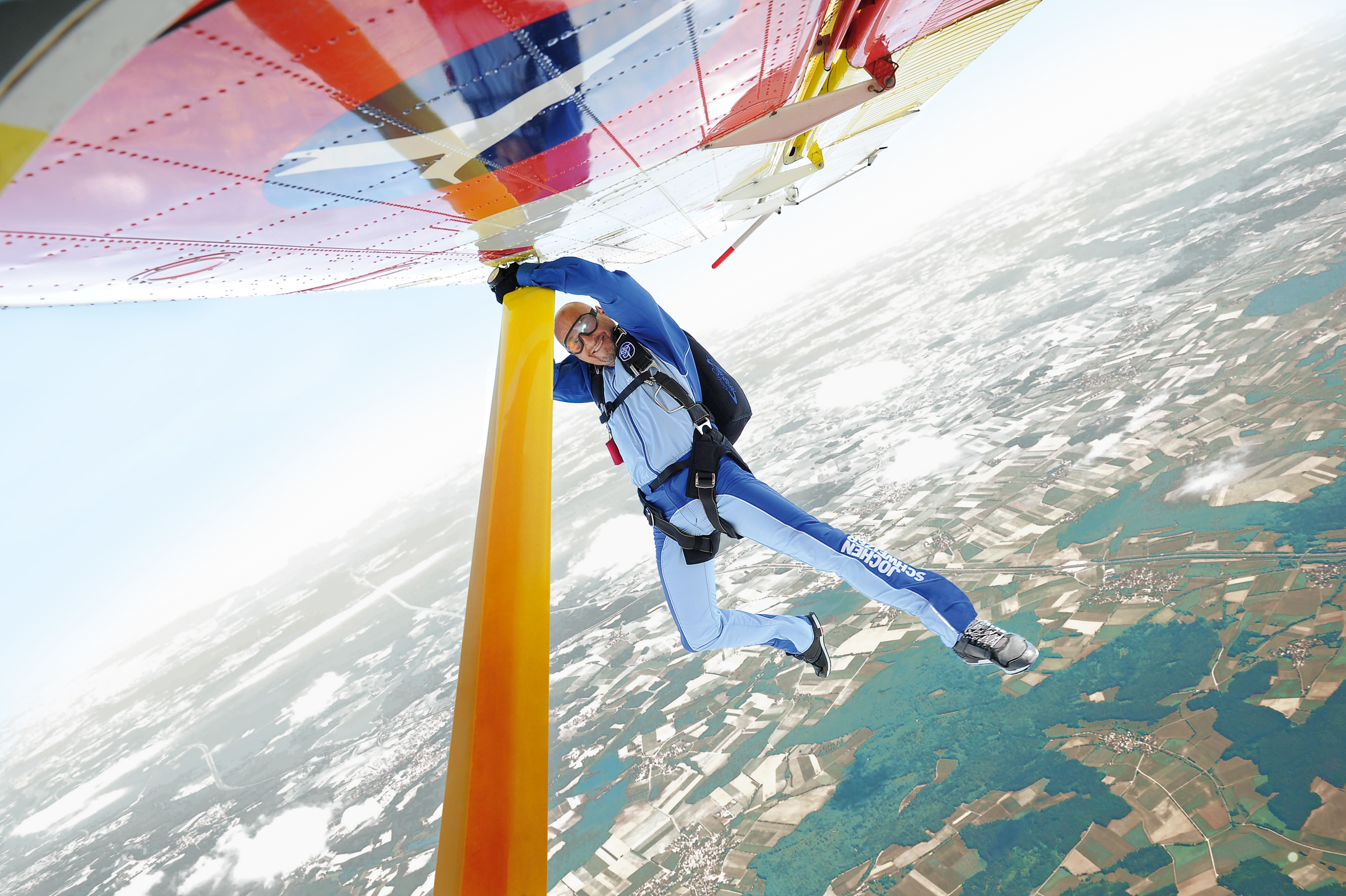 Jochen Schweizer bei einem Stunt im Juni 2014